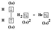 Description